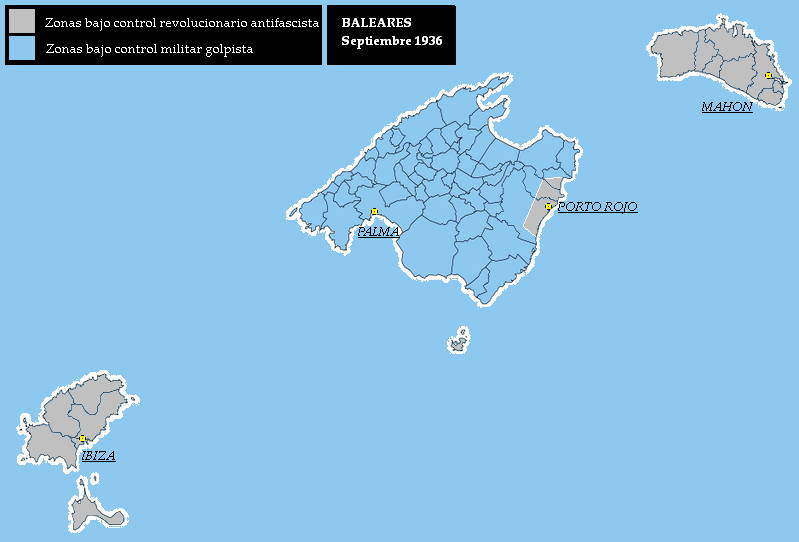 Máxima ocupación de Baleares en septiembre de 1936 Imagen realizada por User:KillOrDie. Máxima extensión de la operación del desembarco de Mallorca de agosto-septiembre de 1936 de las Islas Baleares